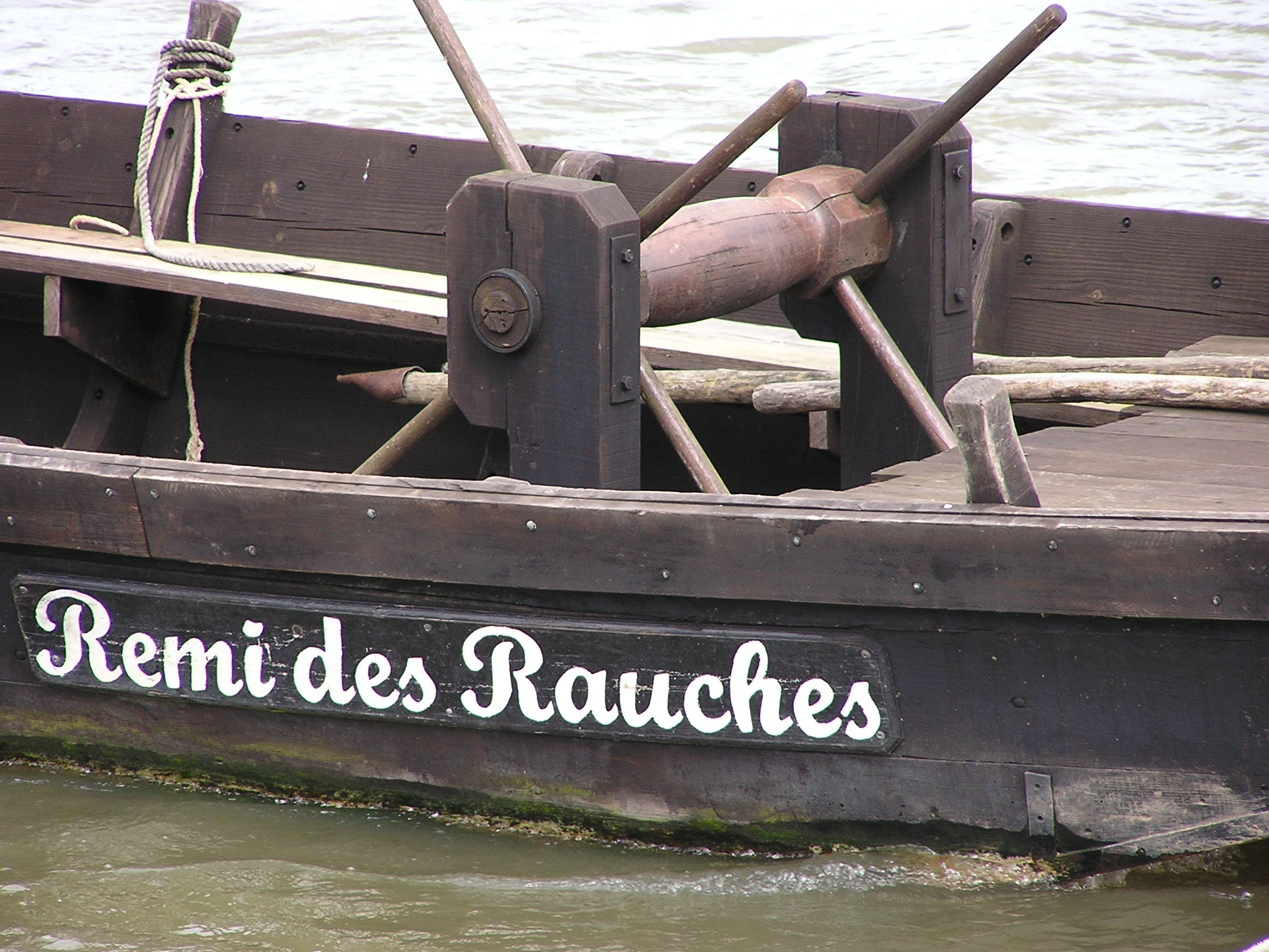 Toue baptisée rémi des Rauches, en honneur à Maurice genevoix